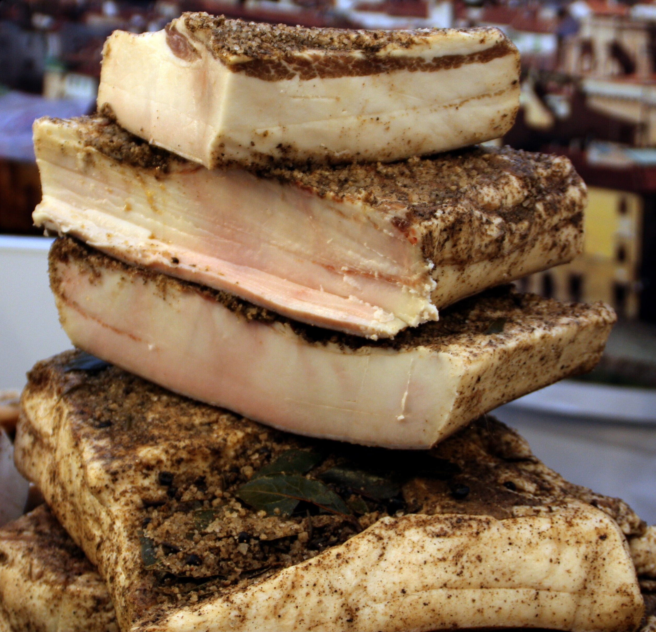 Pezzi di lardo di Colonnata ad affettare – Italia.